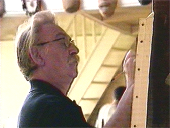 Portrait de Antonio Seguí